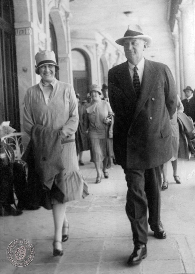 Regina Pacini, fundadora de la Casa del Teatro, en compañía de su esposo el presidente Marcelo T. de Alvear, Mar del Plata 1925. Documento Fotográfico. Inventario 54489.